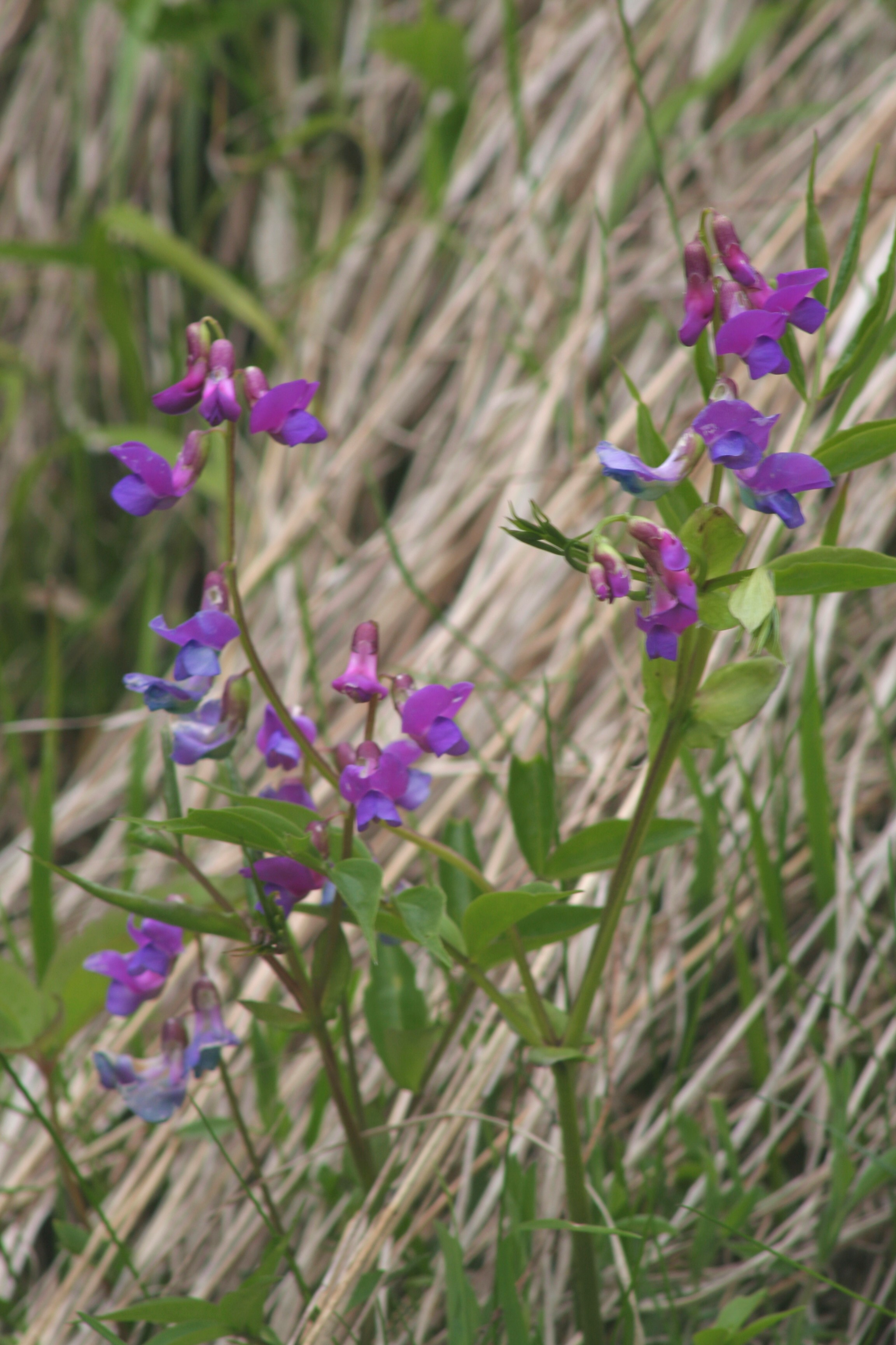 Lathyrus_vernus (Cicerchia primaticcia) Località Passo Duran, Agordo (BL), 1598 m s.l.m.